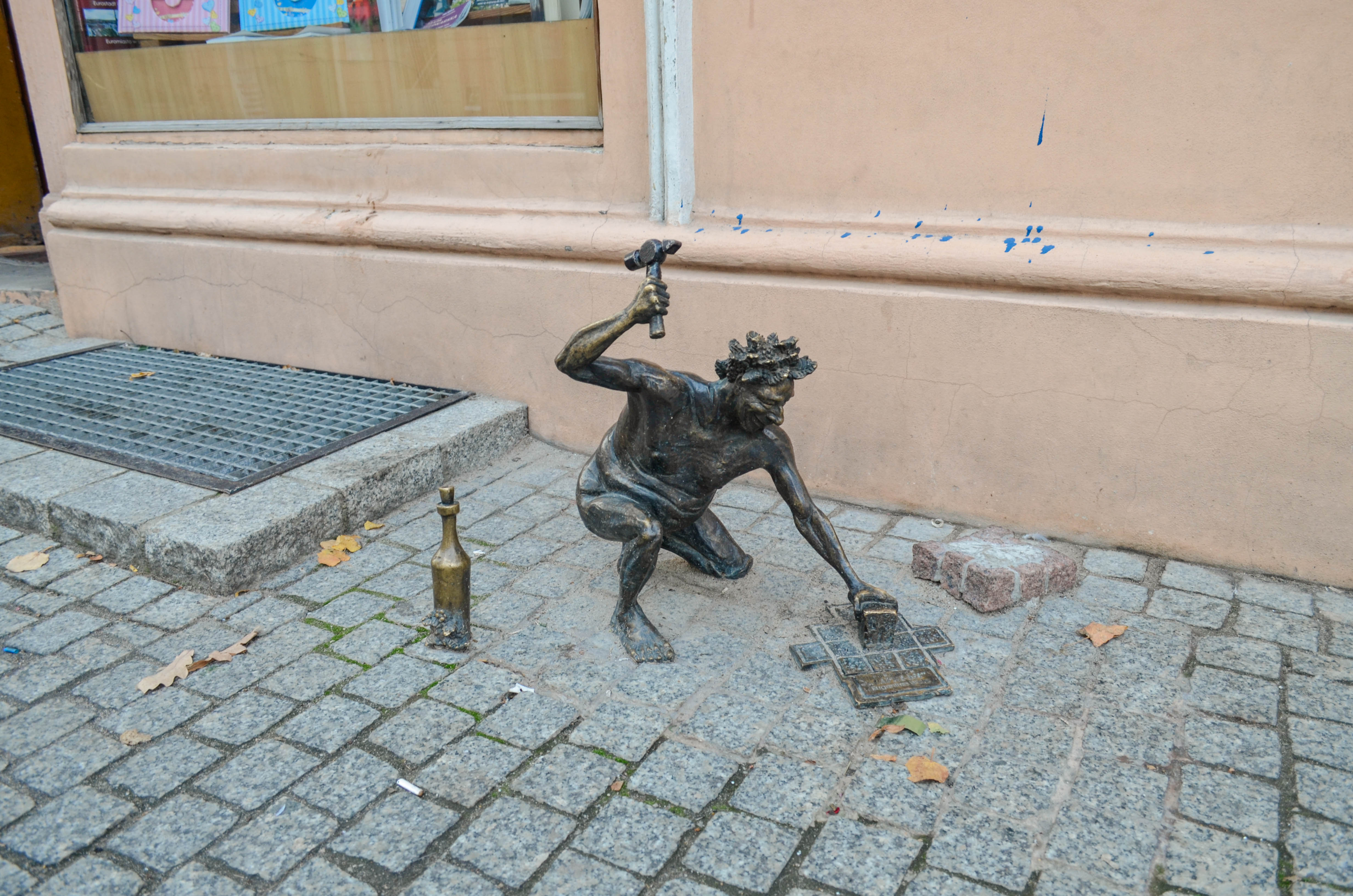 Zielona Góra, dom, kon. XIX